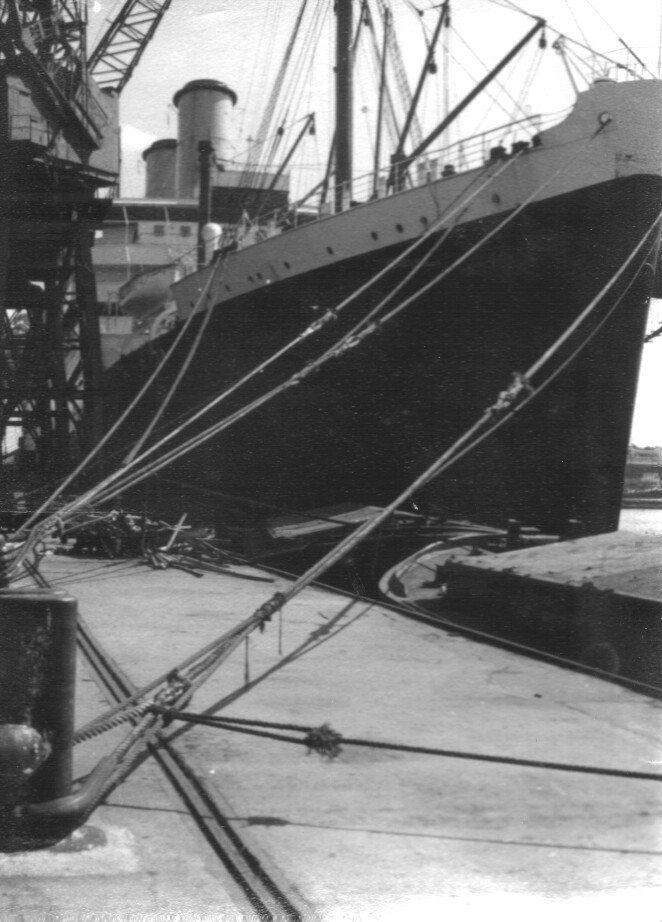 Orient Liner